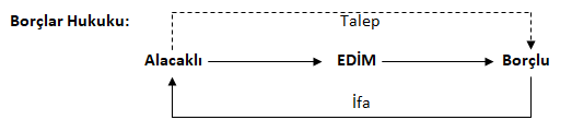 Borcun unsurları şeması